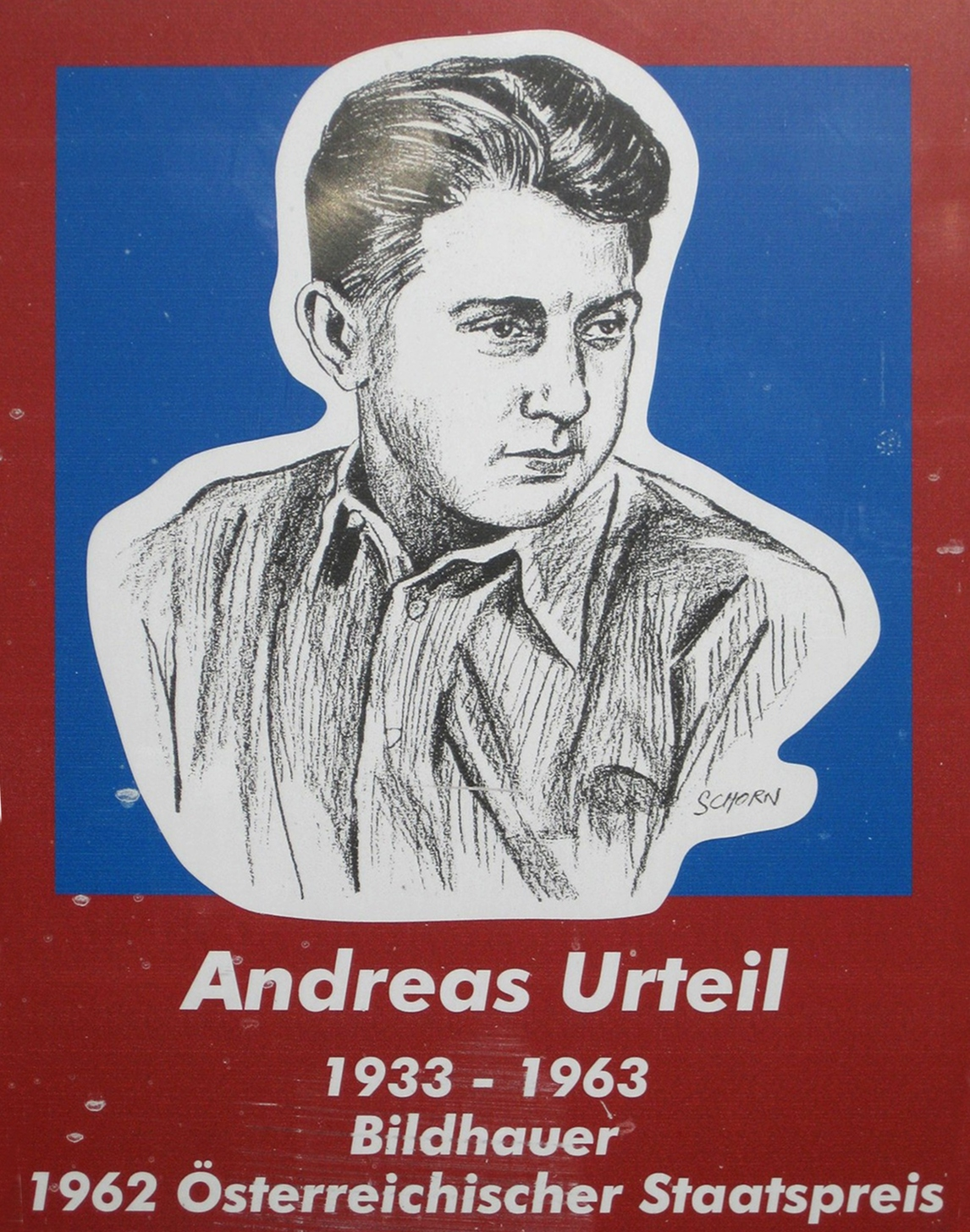 Andreas Urteil-Gedenktafel im Josef Bohmann-Hof am Alfred Kubin-Platz, Wien Donaustadt.